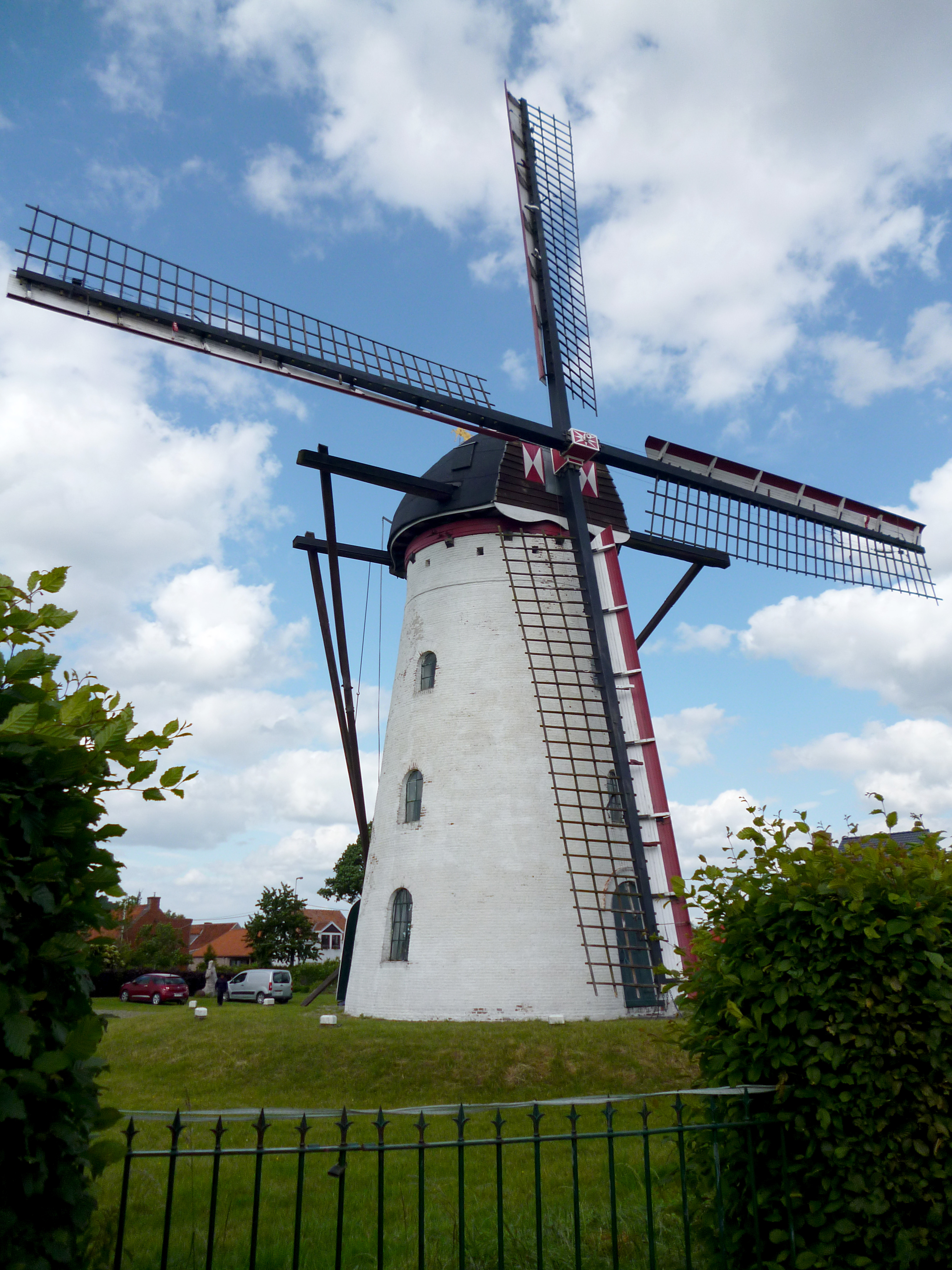 Stenen molen Ertvelde